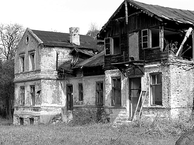 Kłóbka - zespół dworski, k. XIX w.: dwór (zabytek nr 158/A)